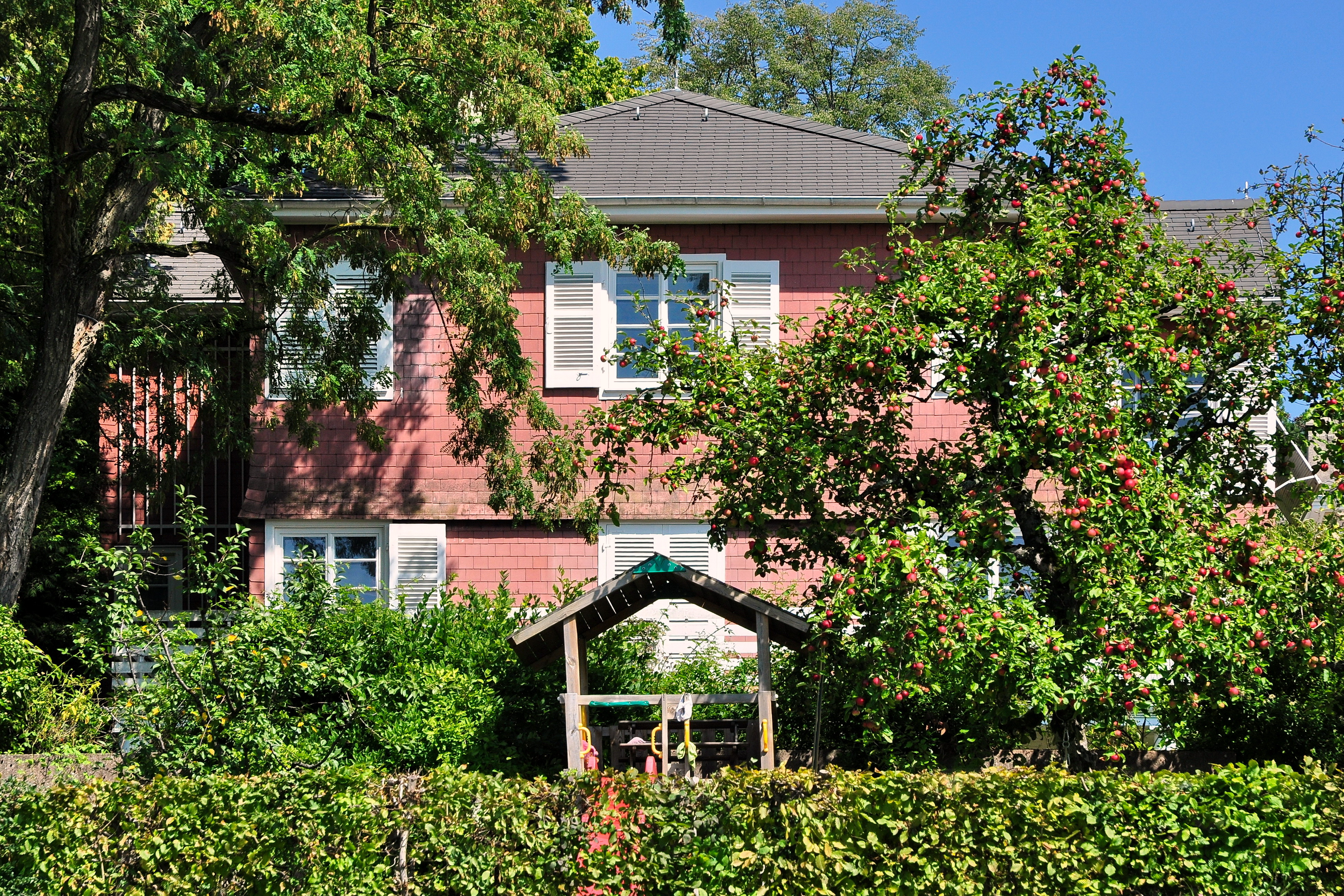 Eigenheim Lux Guyer ‹Sunnebüel›, Am Itschnacherstich 1 in Küsnacht (Switzerland)